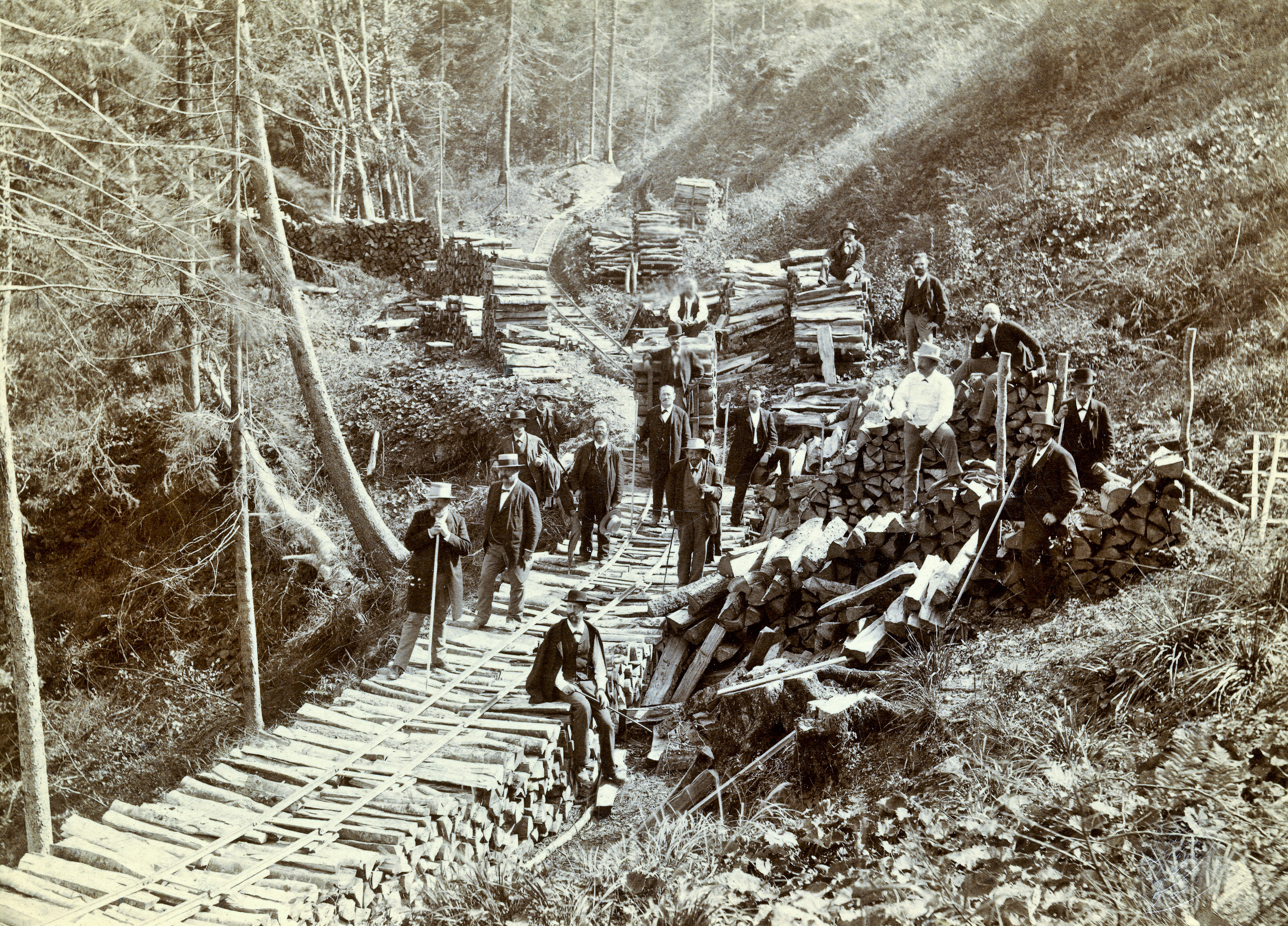 Sihlwaldbahn mit "fliegendem" Not-Geleise, Sihlwald ZH, 1885 (Schneedruckkatastrophe)